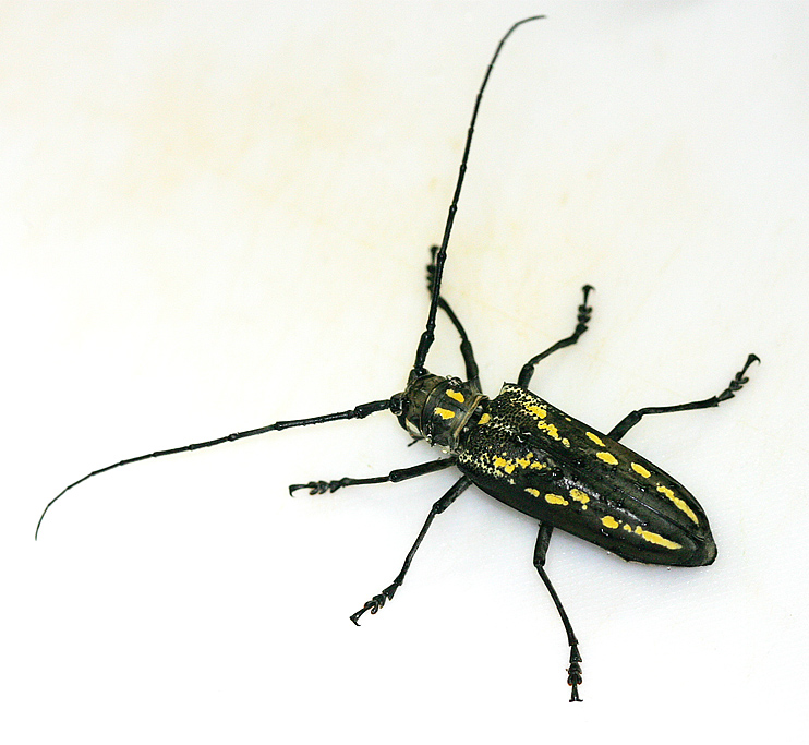 Batocera lineolata from JapanBatocera lineolata